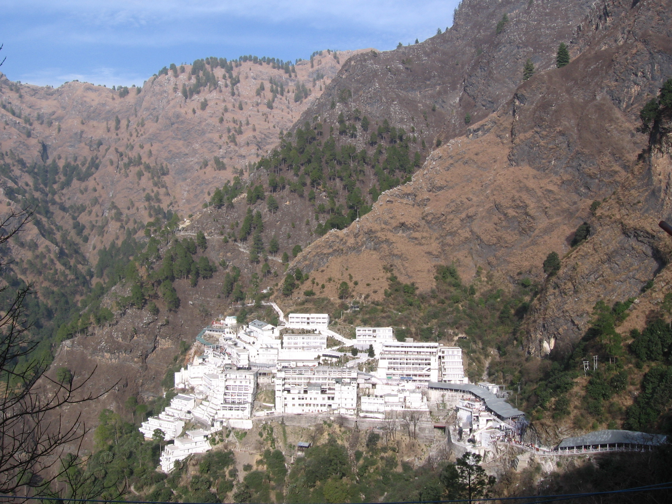 Vaishno Devi Bhawan